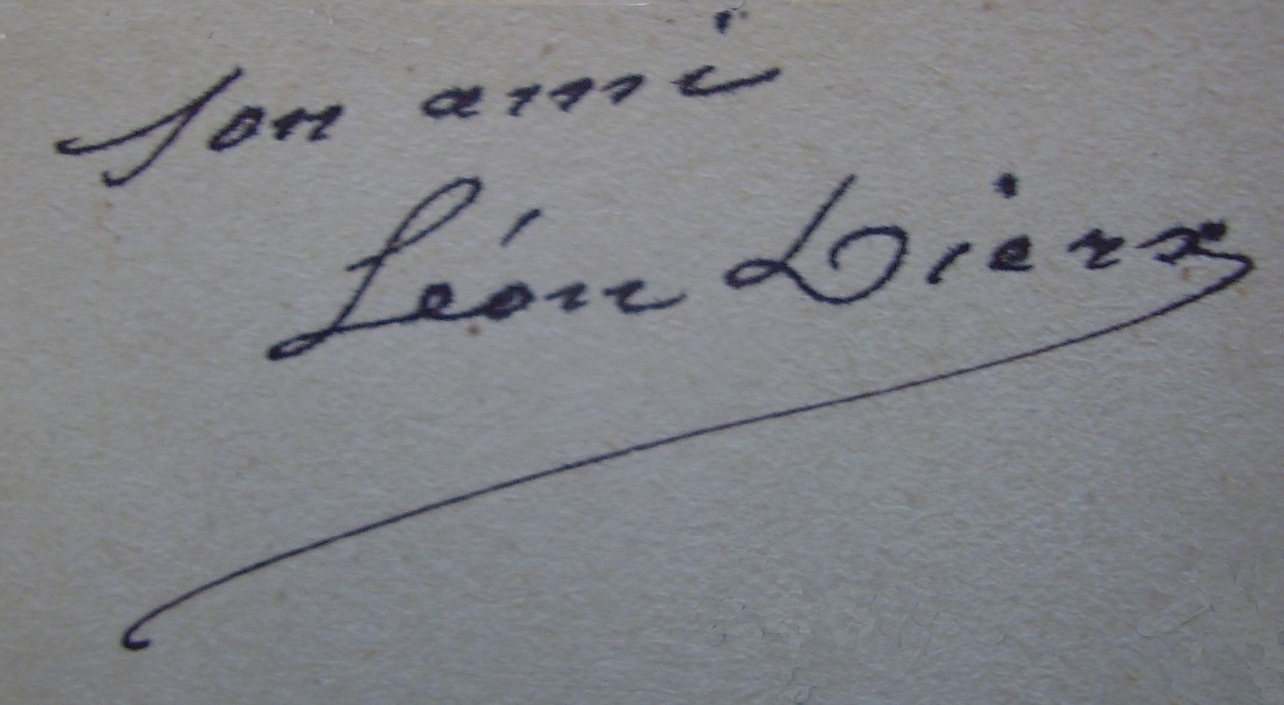 Envoi autographe de Léon Dierx